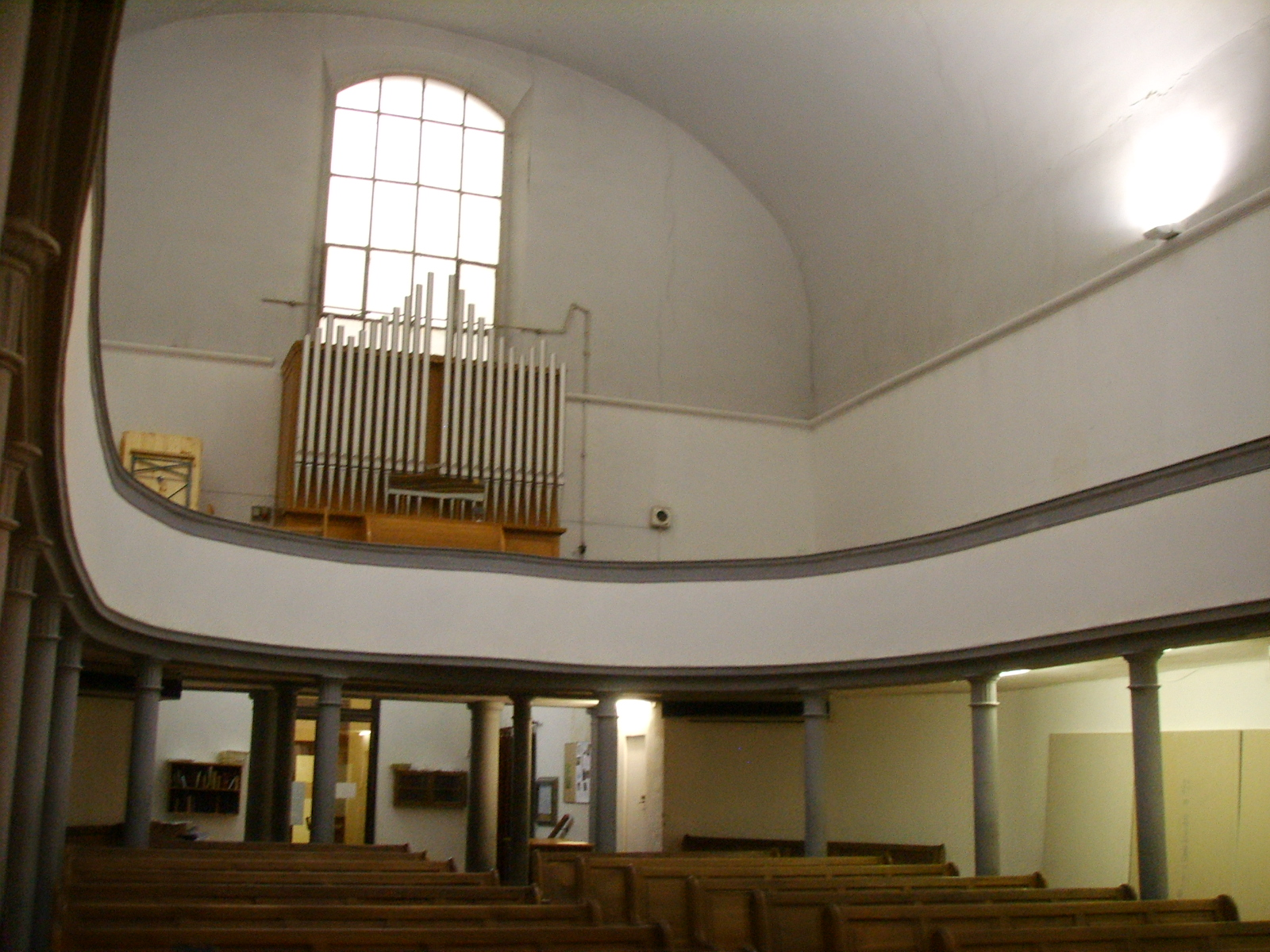 Chiesa Evangelica Battista (Florence) interno